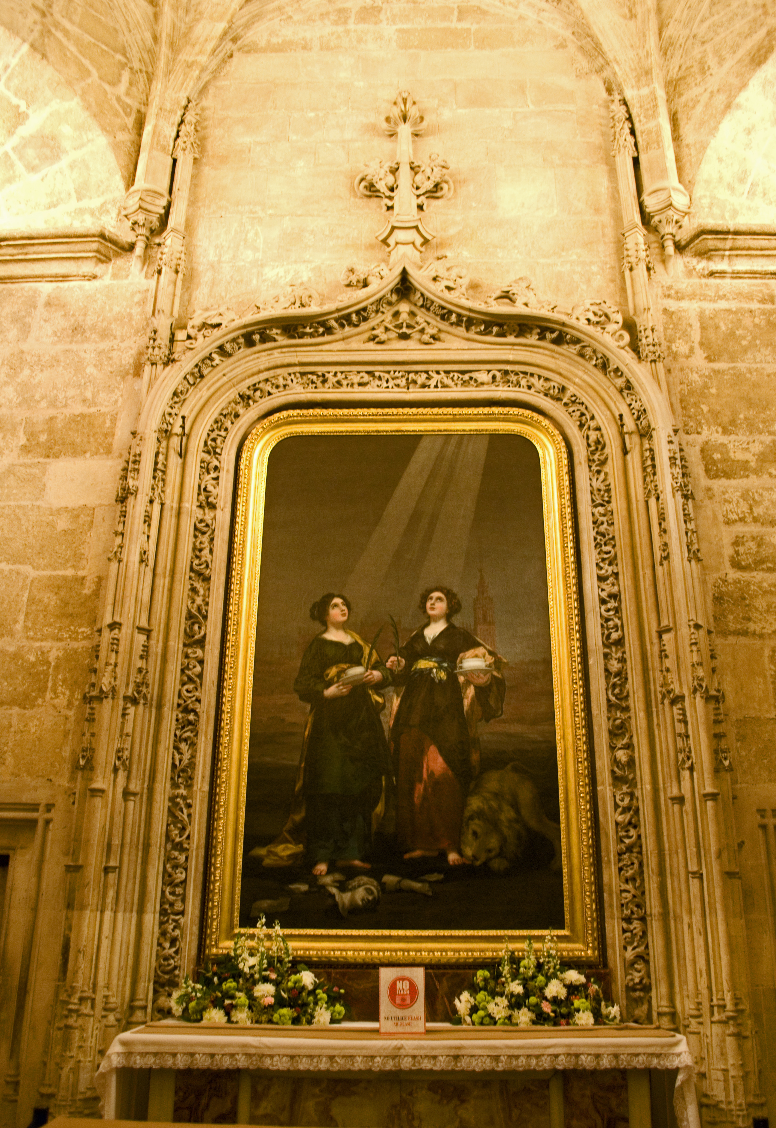 El cabildo catedralicio sevillano le encargó este cuadro a Goya en 1817, y por mediación de Agustín Ceán Bermúdez, que era un erudito y escritor de arte y amigo personal de Goya. El cuadro estaba destinado al altar de la Sacristía de los Cálices de la catedral de Sevilla, (España), donde aún permanece. Y conviene señalar que las santas alfareras, Justa y Rufina, que son las patronas de Sevilla, fueron martirizadas por haberse negado a adorar una imagen de la diosa Venus, y siempre suelen ser representadas junto a objetos de barro como símbolo de su profesión y con las palmas del martirio. En esta obra un león lame mansamente el pie de Santa Rufina, herido por haberla forzado a caminar desde la sierra hasta Sevilla, y esta ciudad aparece al fondo, destacándose la Torre de la Giralda de la catedral sevillana, que según la tradición quedó en pie por la intervención milagrosa de estas mártires durante el terremoto que asoló Sevilla en 1504.